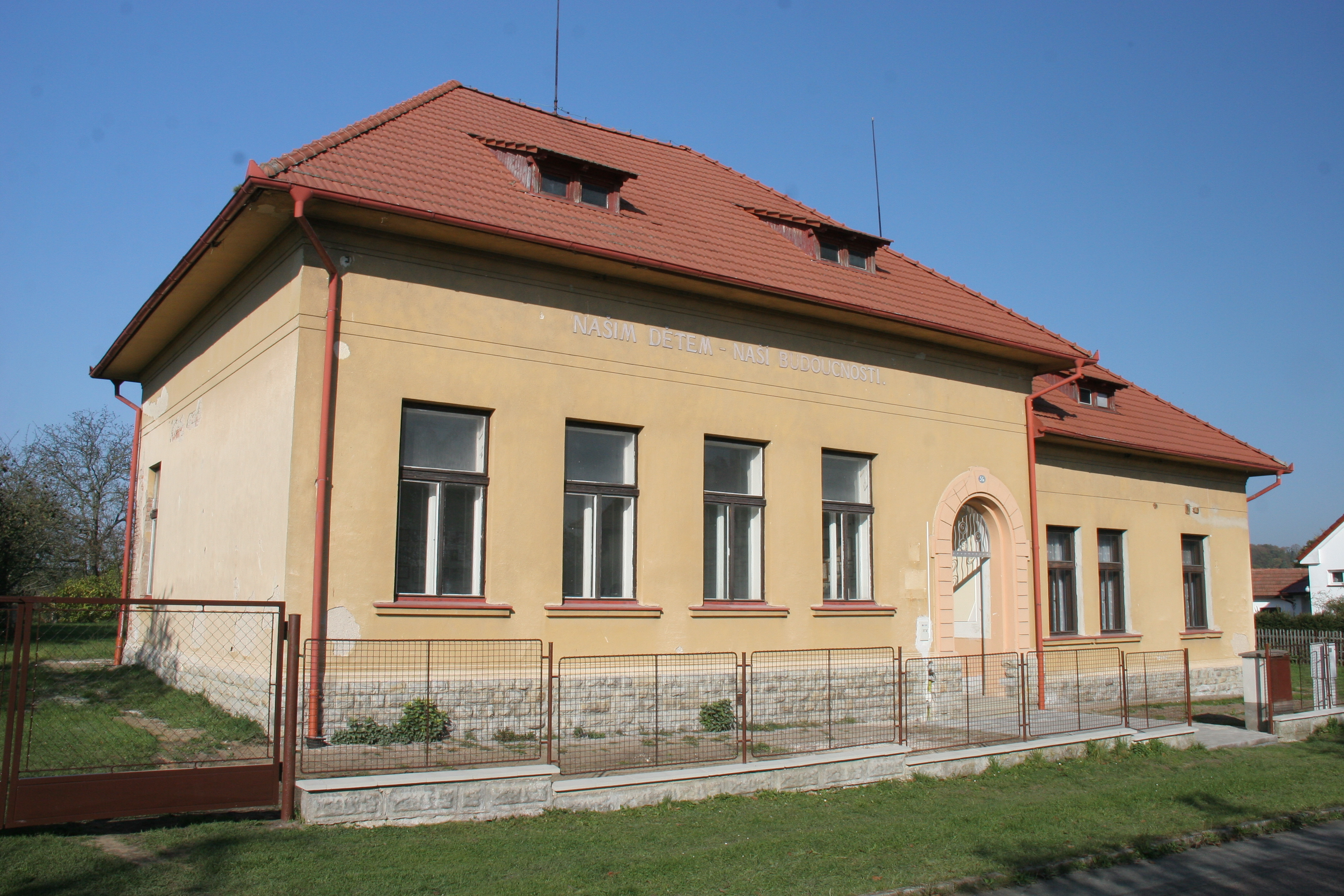 Týnišťko bývalá škola